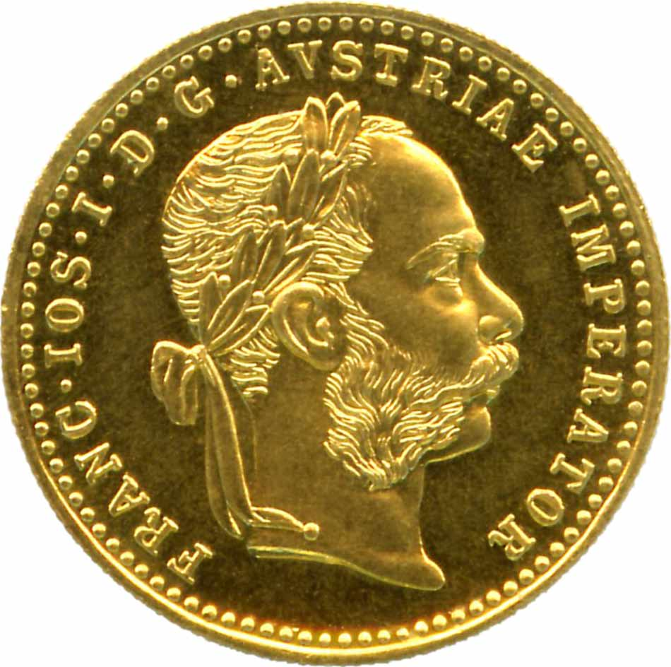 Österreichischer Golddukaten 1-fach, Vorderseite